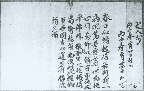 King Kyungsoon of Silla